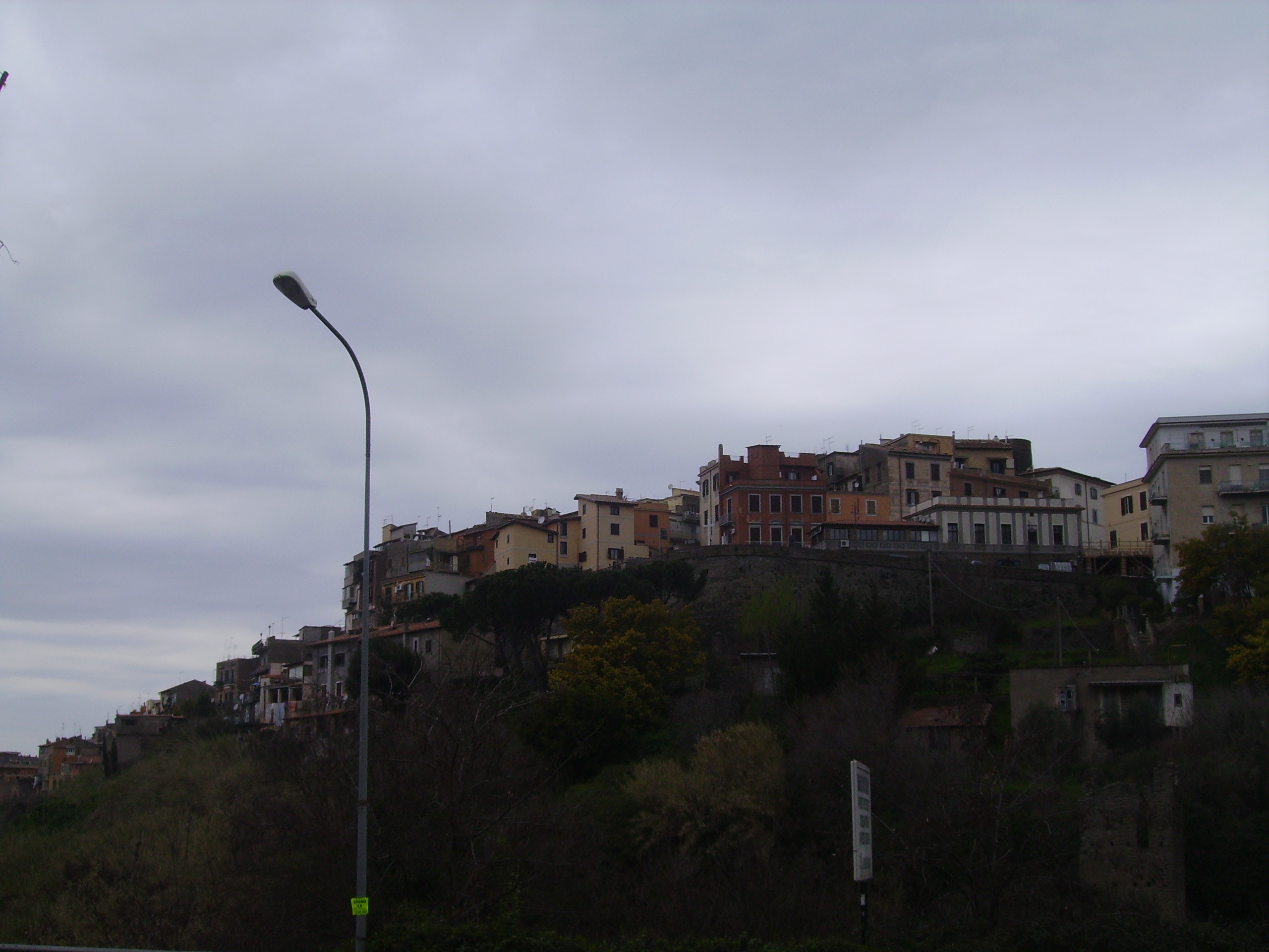 Marino dal Bosco